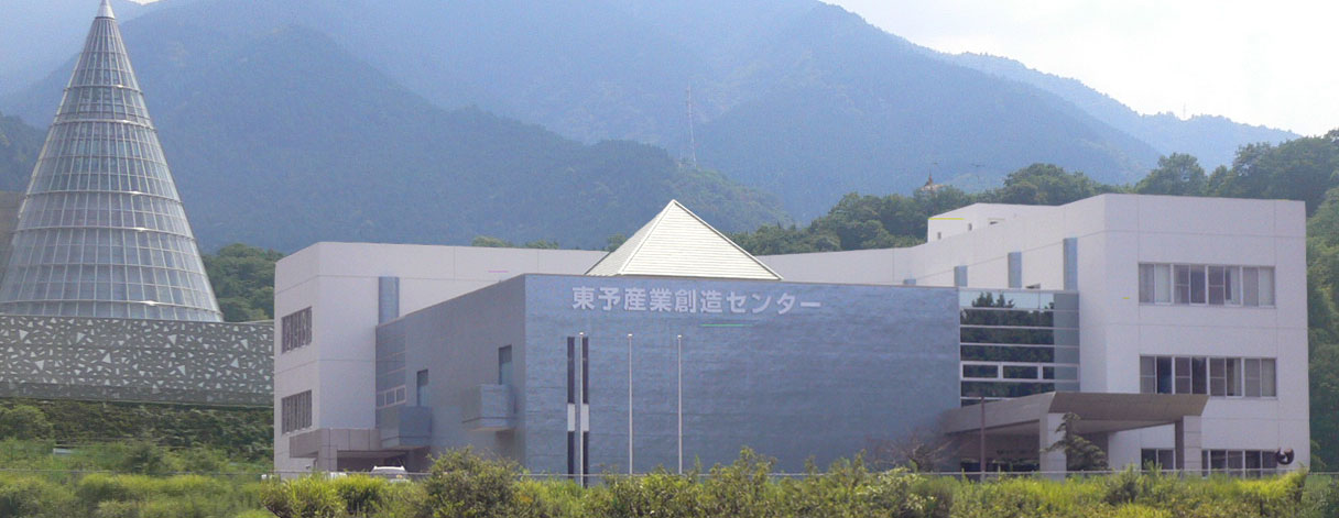 東予産業創造センターの外観写真。